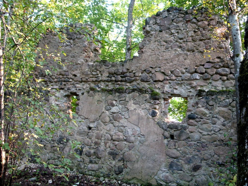 Skujeni ordulinnuse varemed.